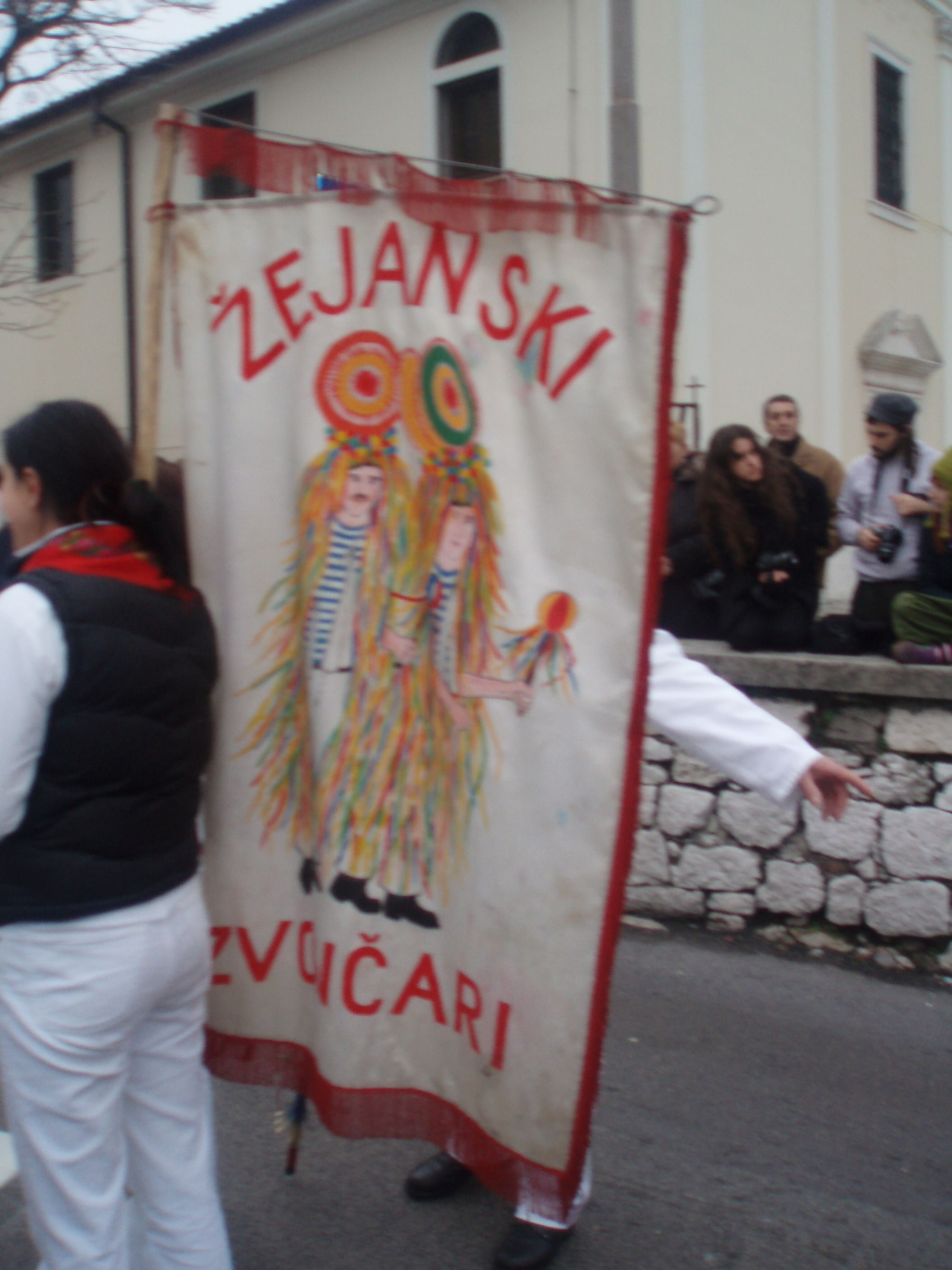 Zastava Žejana, Hrvatska